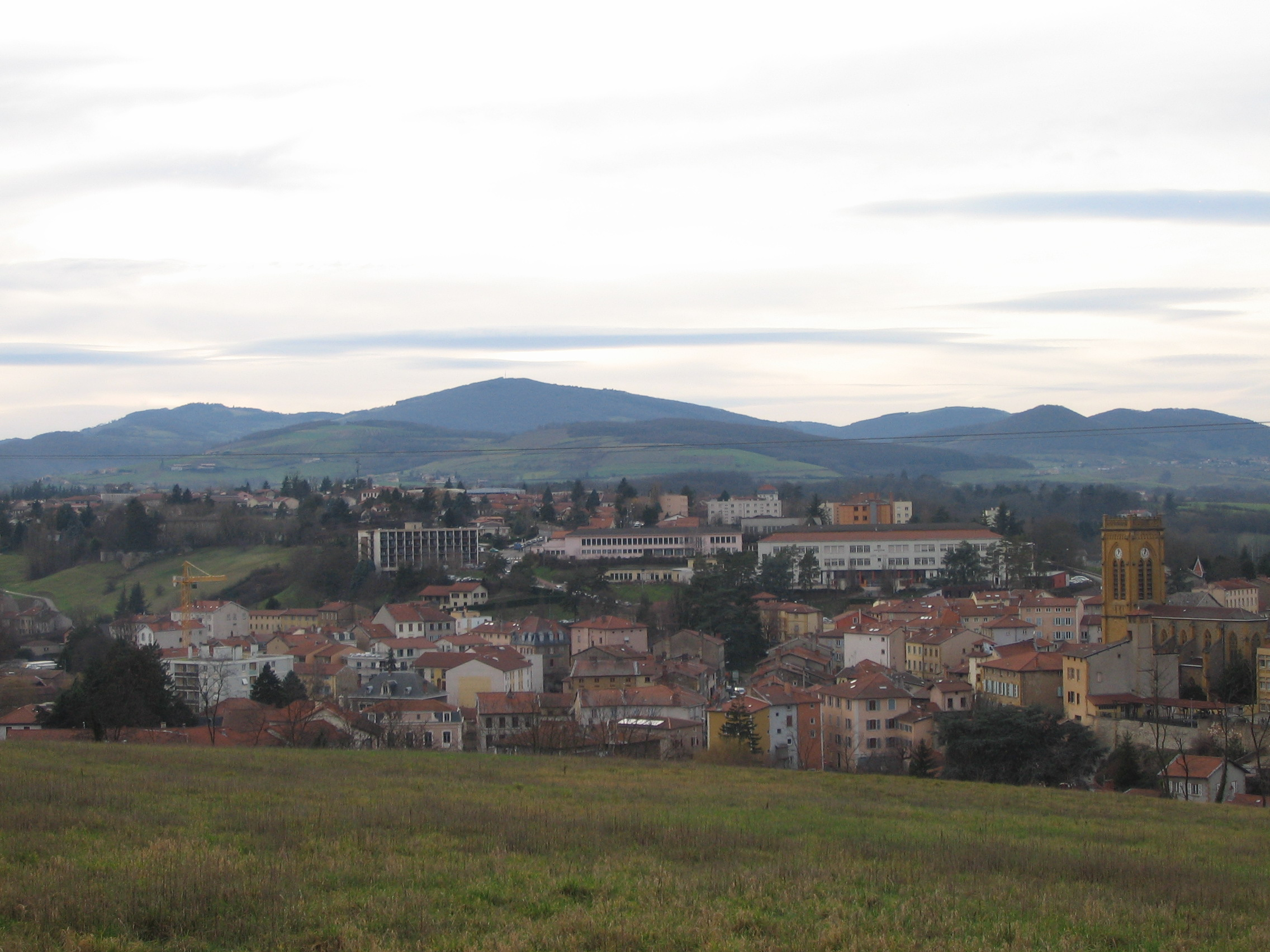 L'Arbresle (Rhône) -- à droite, église St-Jean Baptiste en pierres jaunes caractéristiques/carrières de Glay.